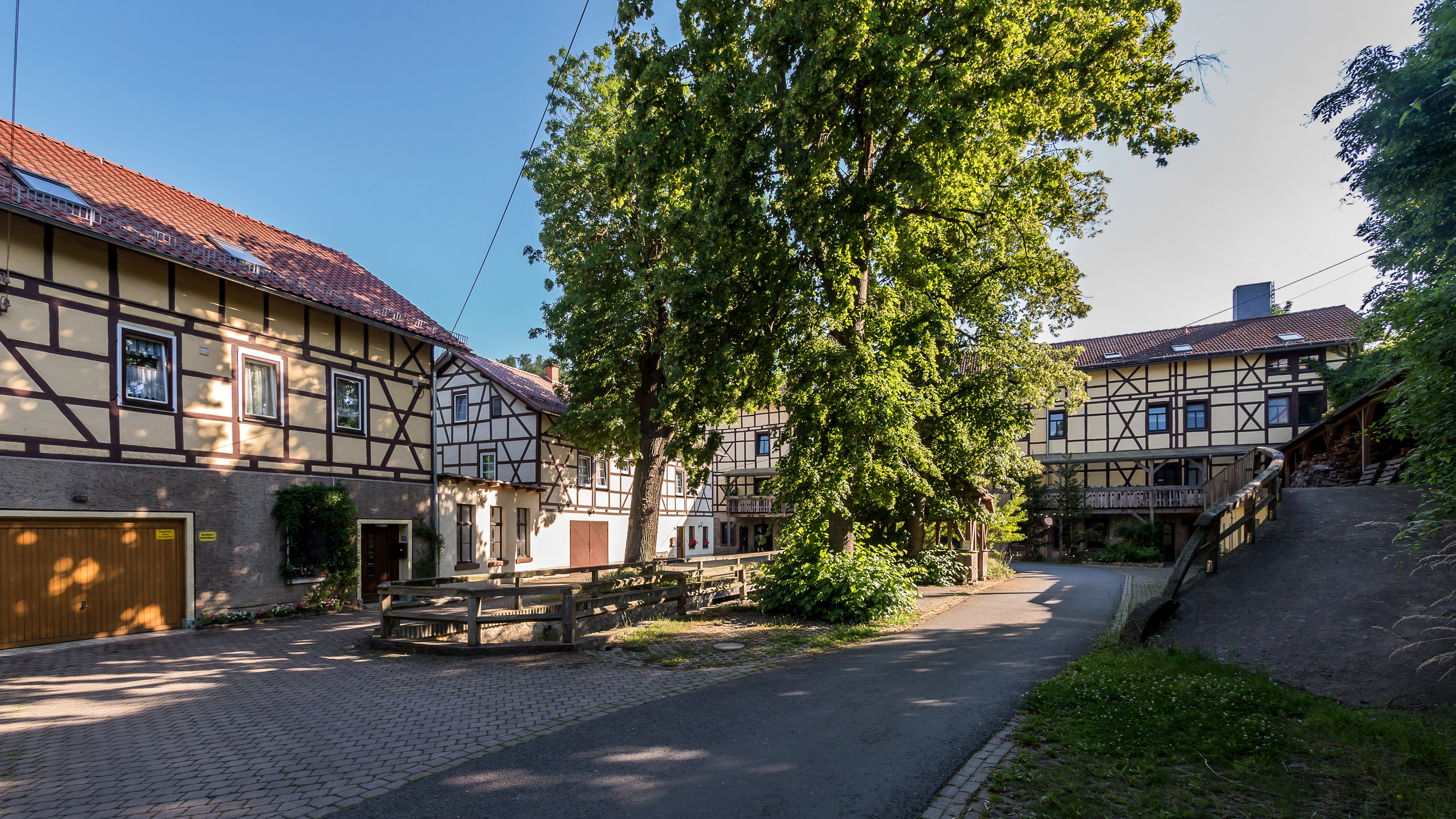 Hetschburg Haus Nr. 23 ehemalige Obermühle Hofansicht I